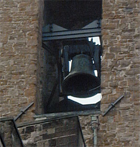 Palazzo del Paciarelli, piazza della Repubblica, Firenze.